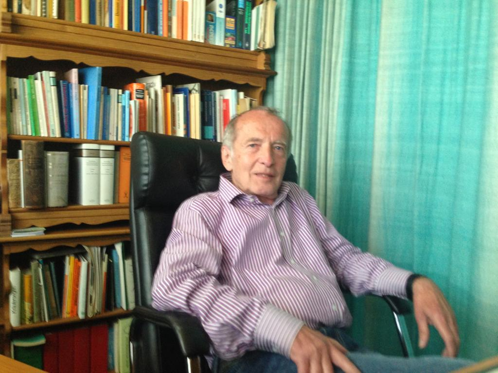 Werner J. Meinhold - niemiecki psychoterapeuta, hipnoterapeuta i narutopata. Twórca Hipnointegracyjnwj Psychoterapii Głębi (H.I.T.T.®).